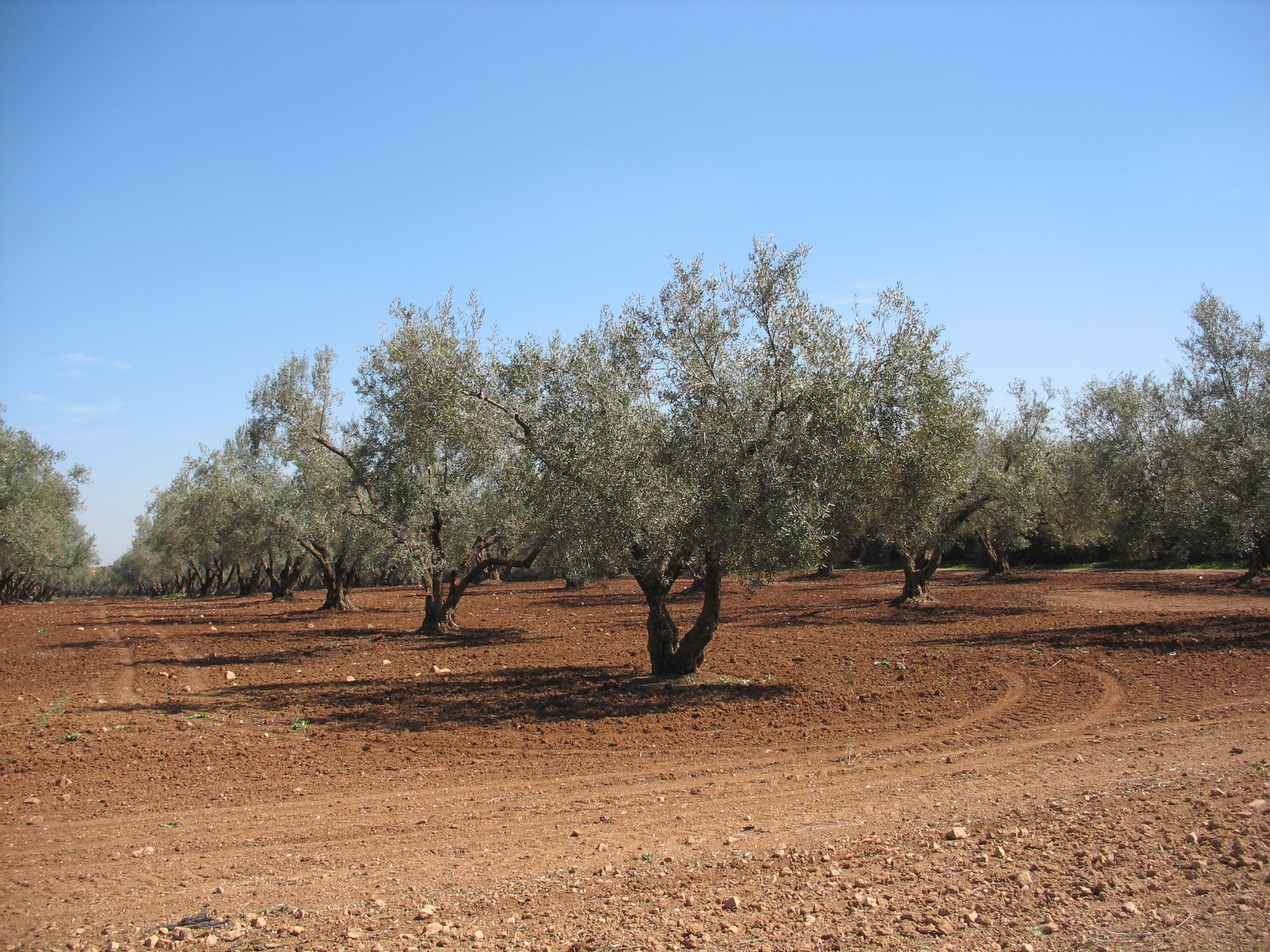 Verger expérimental d'oliviers - région de Meknès